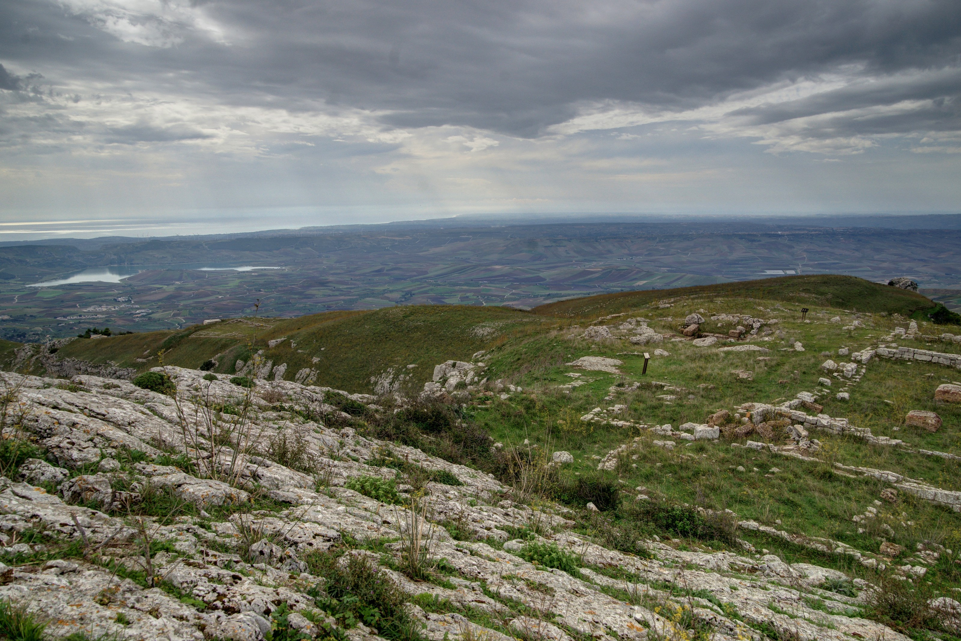 Monte Adranone: Blick von der Akropolis